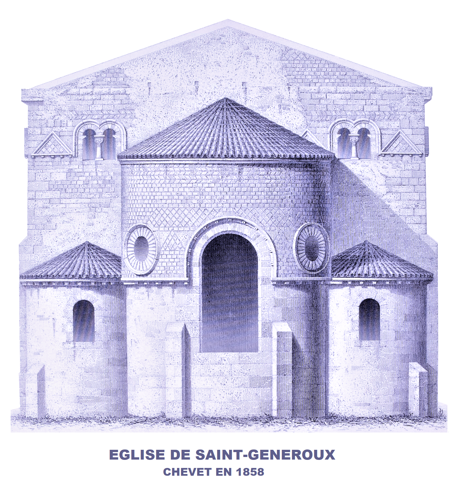 Eglise de Saint-Généroux (79), chevet (image du domaine public (Gailhabaud 1858) modifiée)